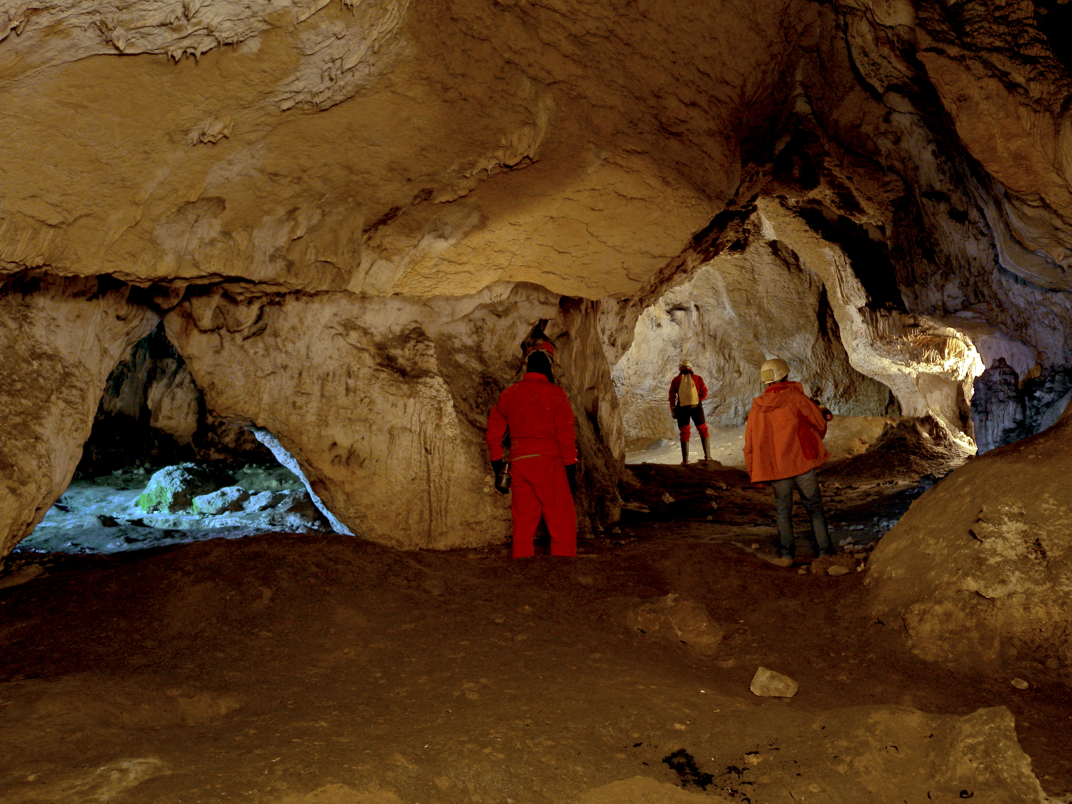 Primeros metros del nivel inferior de la Cueva de Atxurra, donde se localiza el yacimiento.